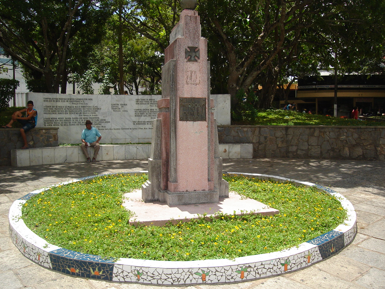 Monumento em homenagem a Teodósio de Oliveira Lêdo, responsável por primeiro ocupar o território de Campina Grande, Paraíba.